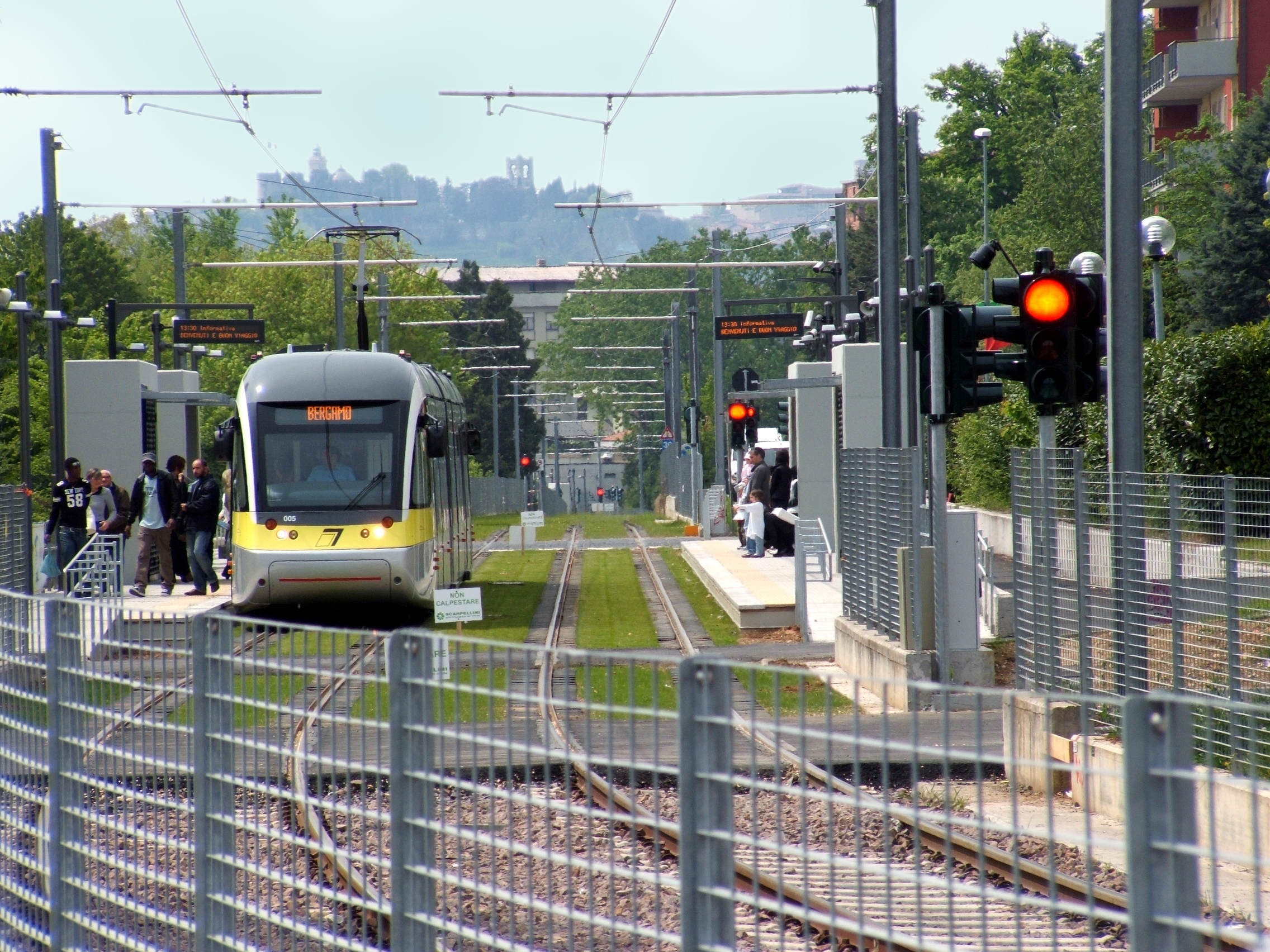 Tranvia Bergamo-Albino a Torre Boldone il primo giorno di esercizio